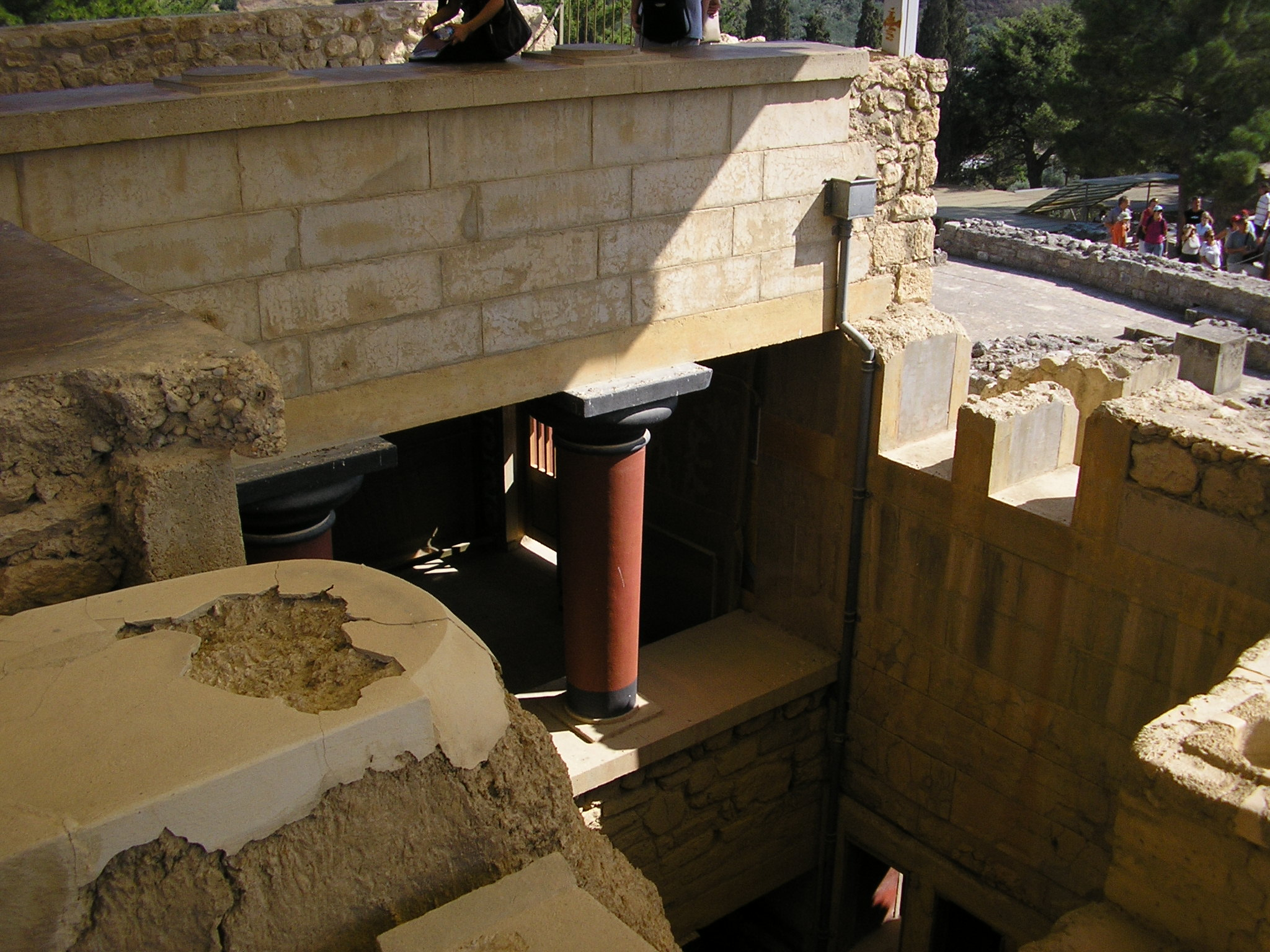 Всередині палацу було передбачено «шахти», які пронизували всі поверхи, та призначались для освітлення та вентиляції